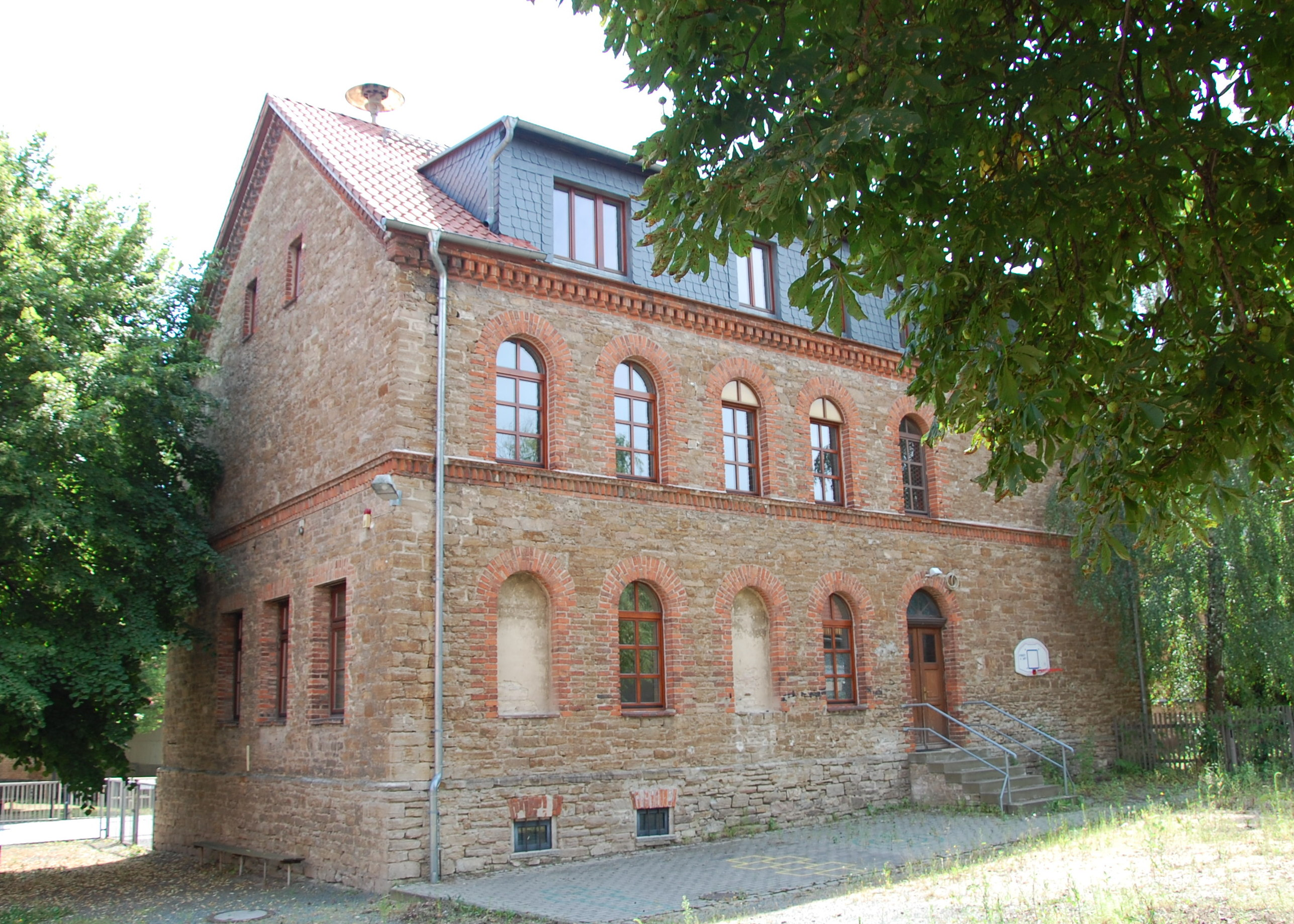 Haus Schulstraße 7 in Bad Suderode